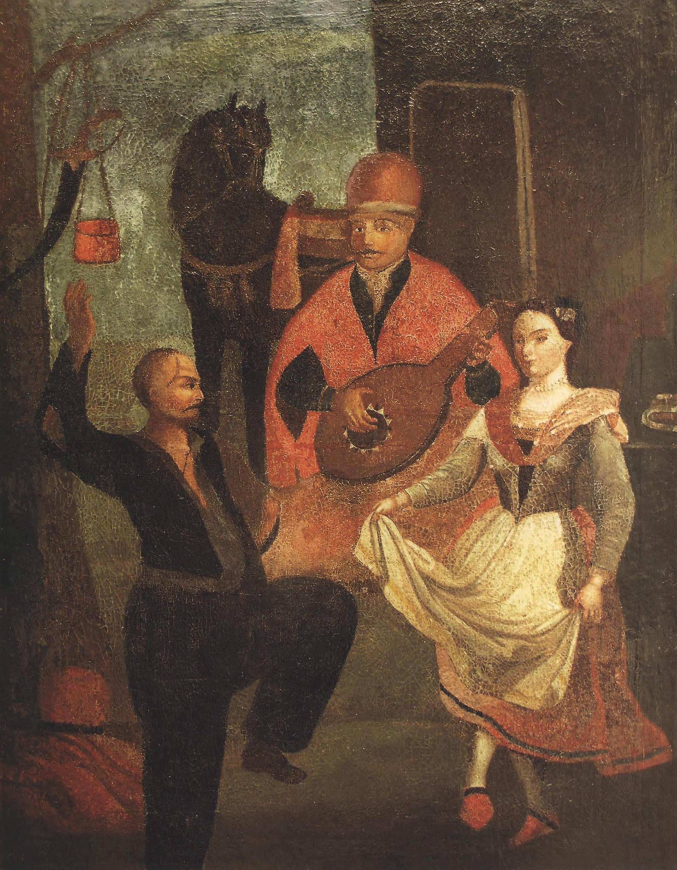 Гопак